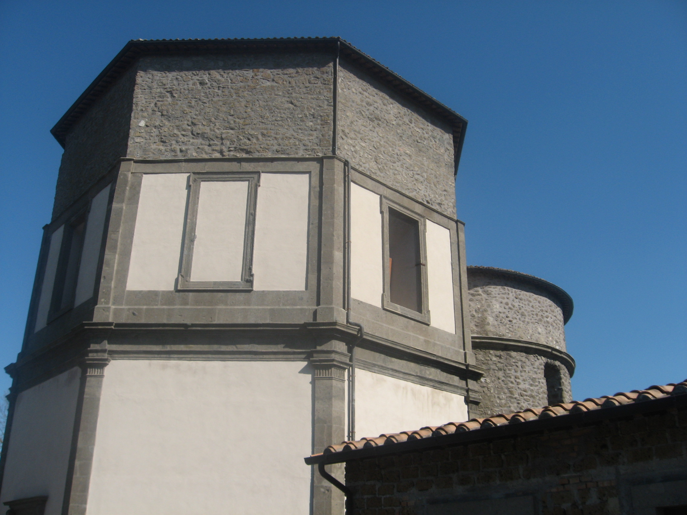 Foto della facciata posteriore della Chiesa di S. Maria di Montedoro